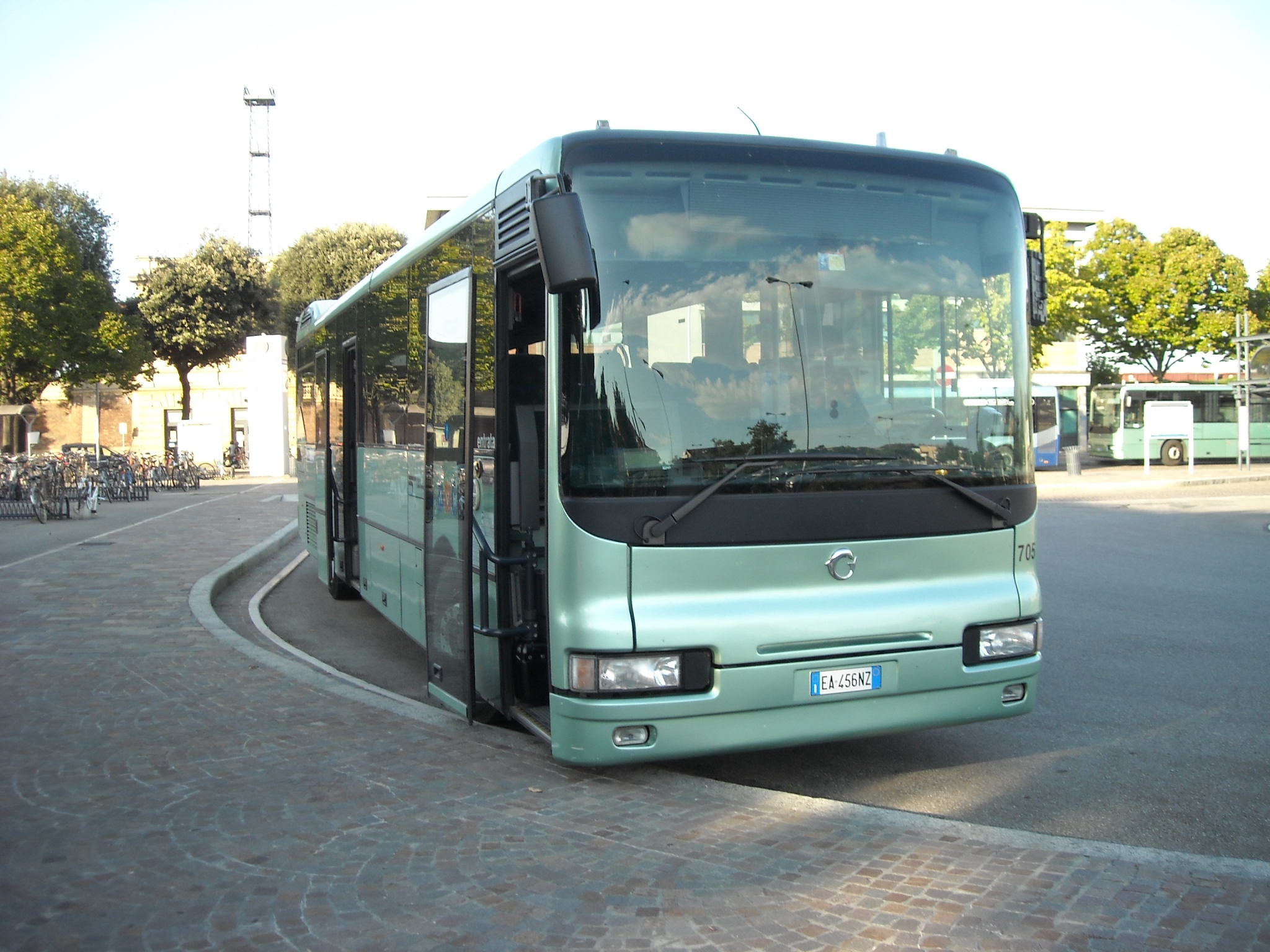 Autobus extraurbano Irisbus MyWay di AVM in autostazione a Forlì.